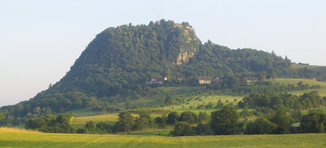 Der Berg Hohentwiel, Aufgenommen von G.Heilmann Sommer 2004